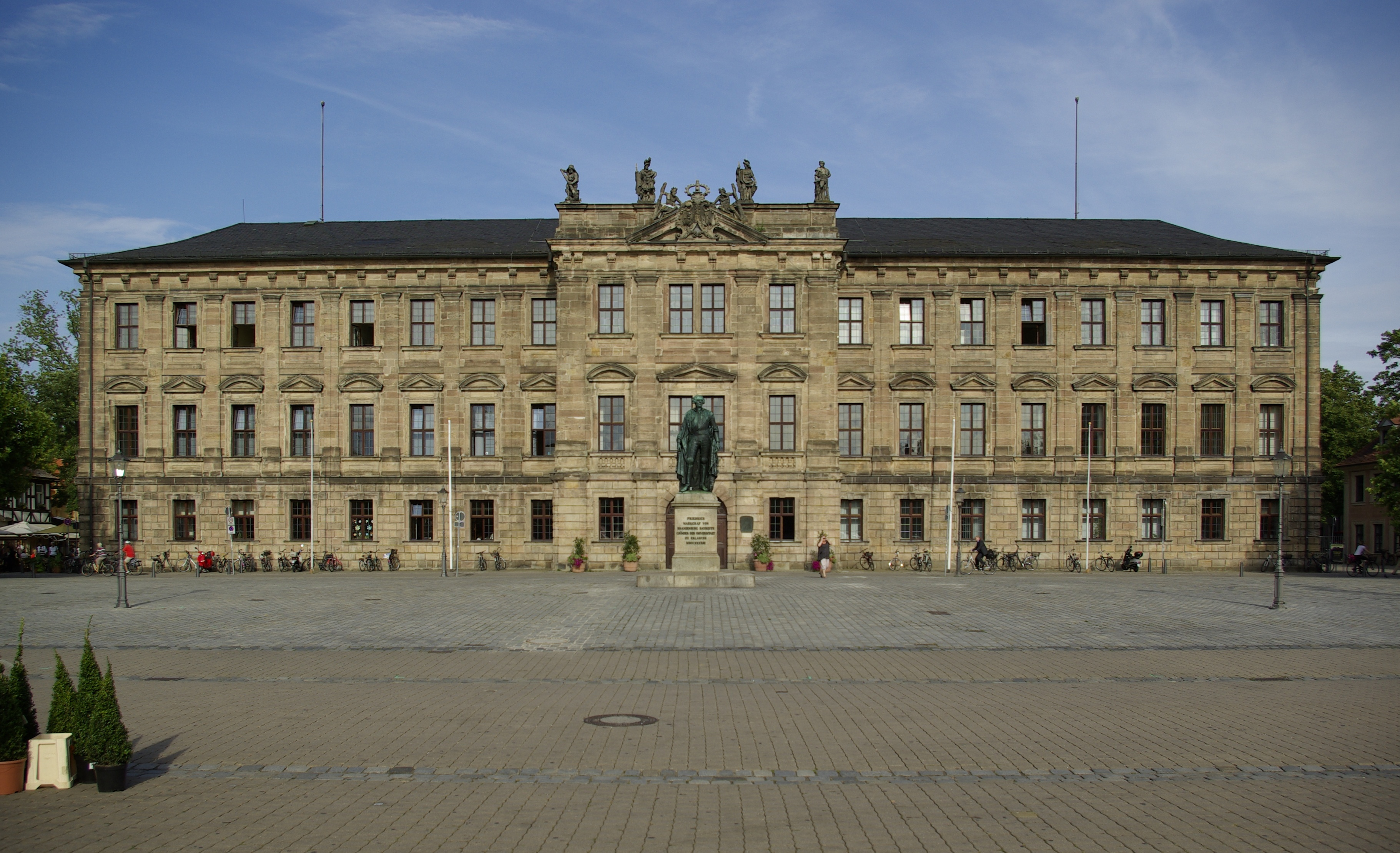 Blick über den Schloßplatz auf das Markgräfliche Schloss in Erlangen.